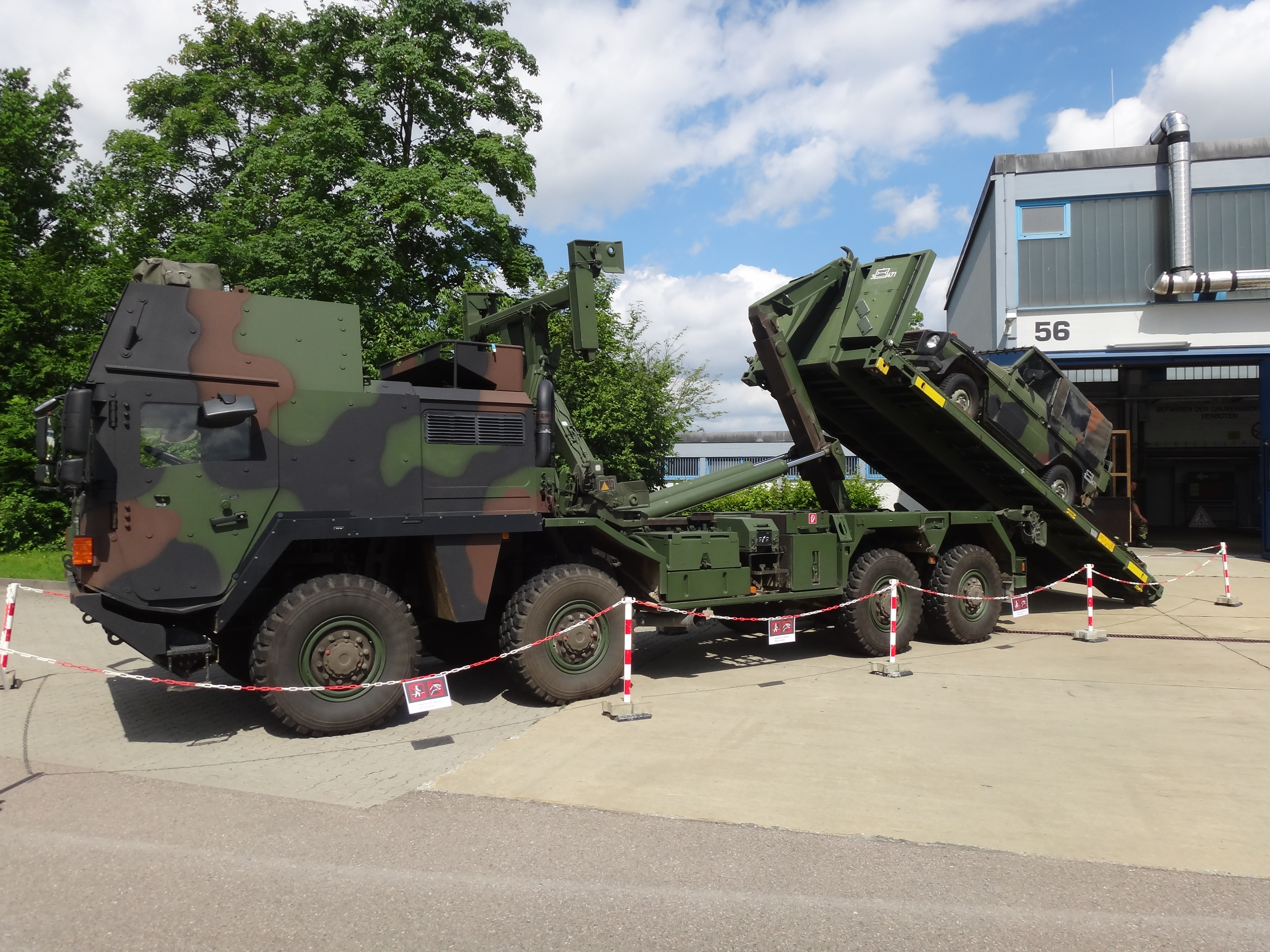 LKW 15t mil gl MULTI